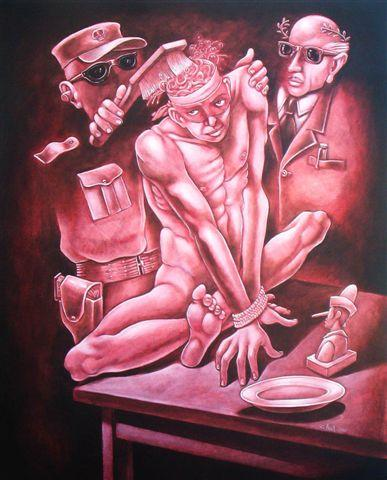 Pintura política-social